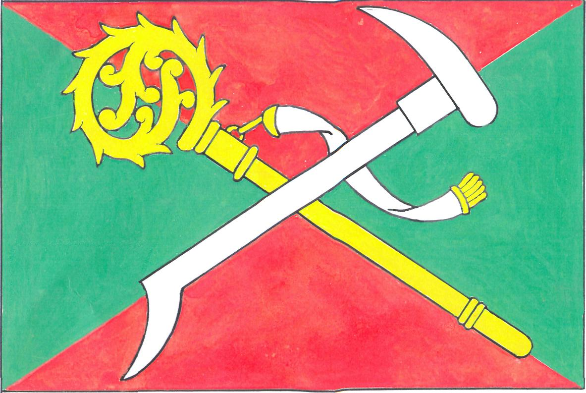 Česky: vlajka obce Želechovice